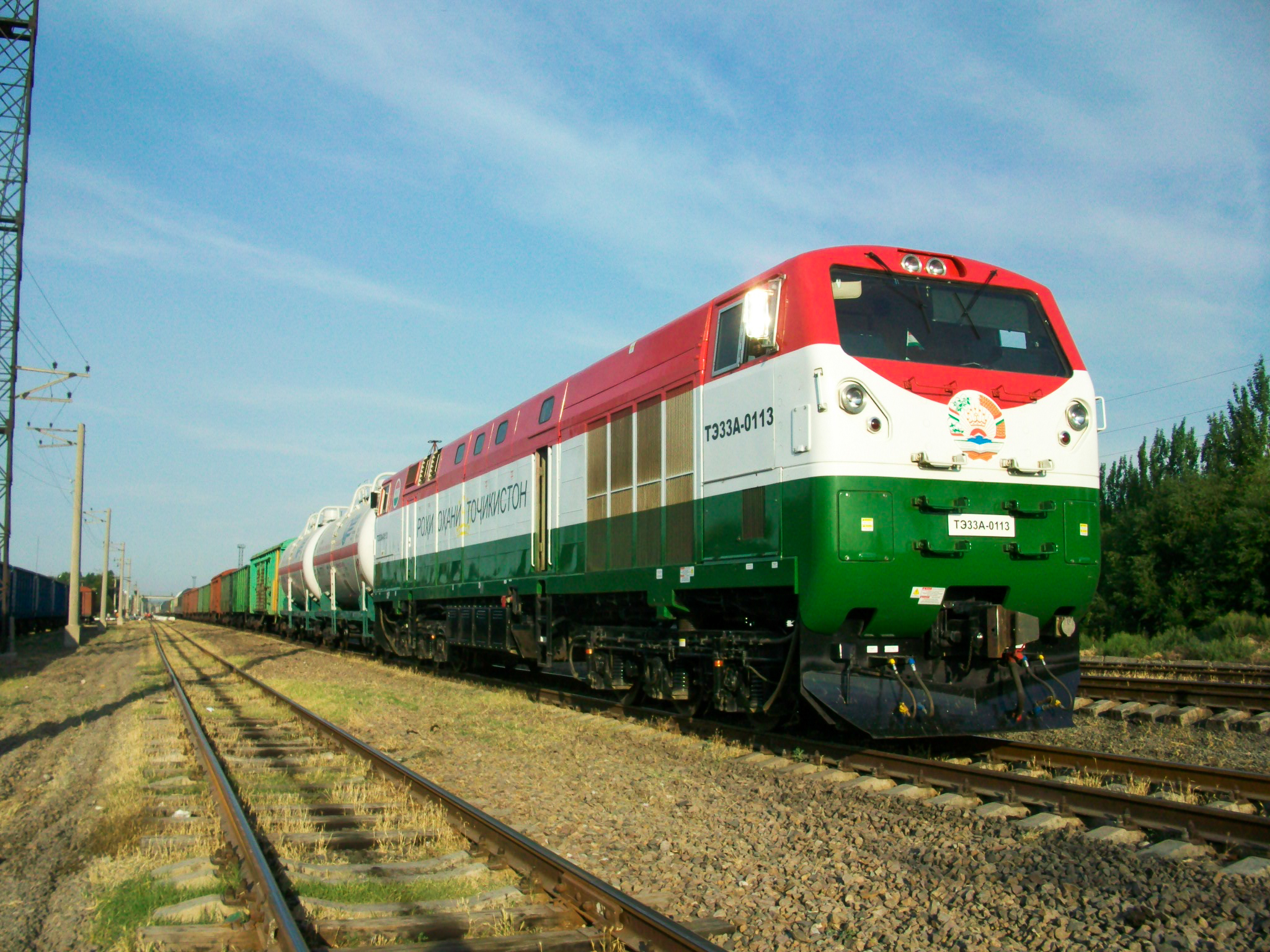 Тепловоз ТЭ33А-0113 с грузовым поездом